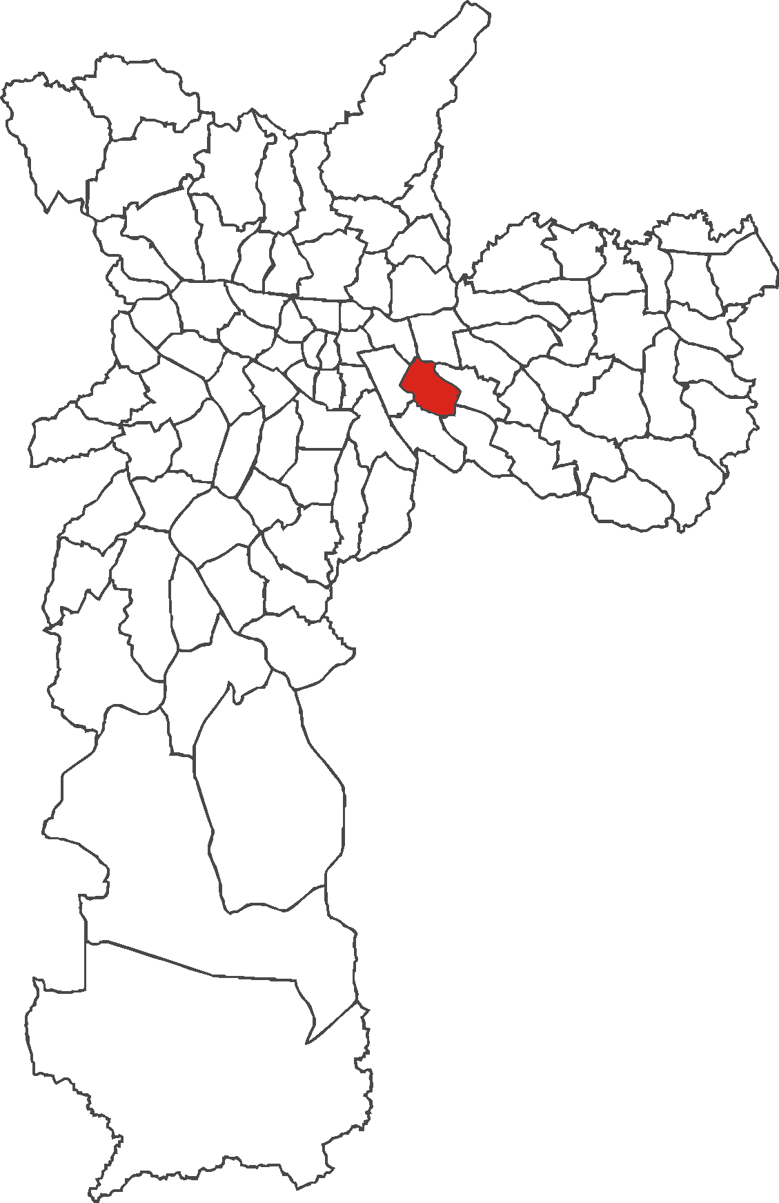 Localização do distrito de Água Rasa no município de São Paulo.